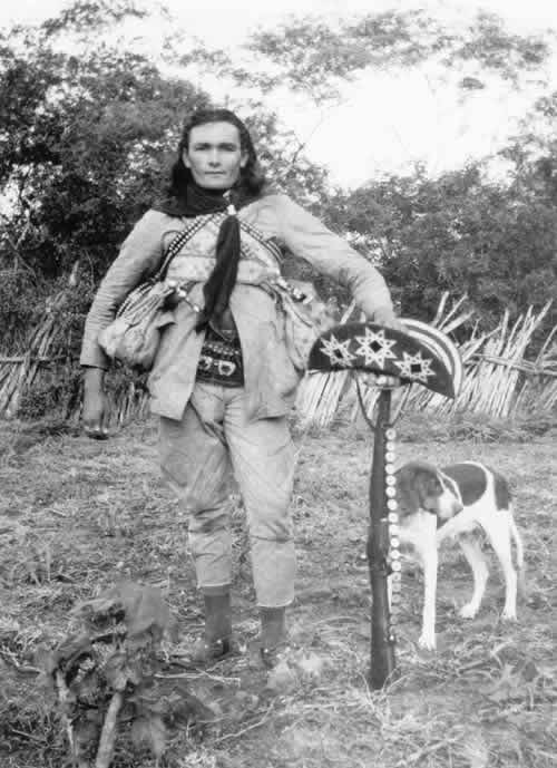 Retratos do cangaço: Corisco.jpg